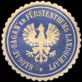 Sealing stamp Title: Glogau - Saganer Fürstenthums Landschaft Description: blau, weiß, geprägt Place: size: 4 cm